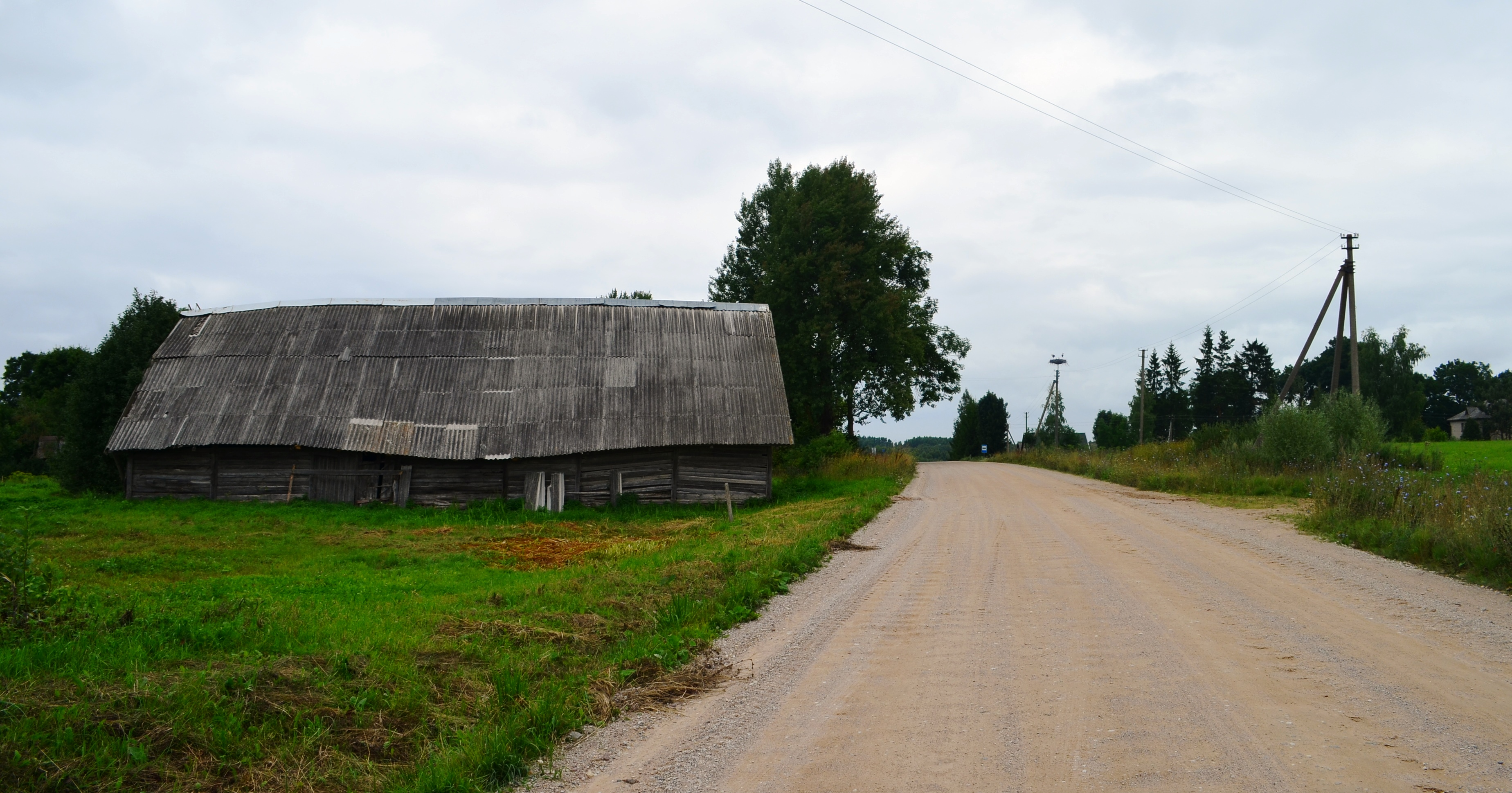 Norvaišiai, Utenos r.